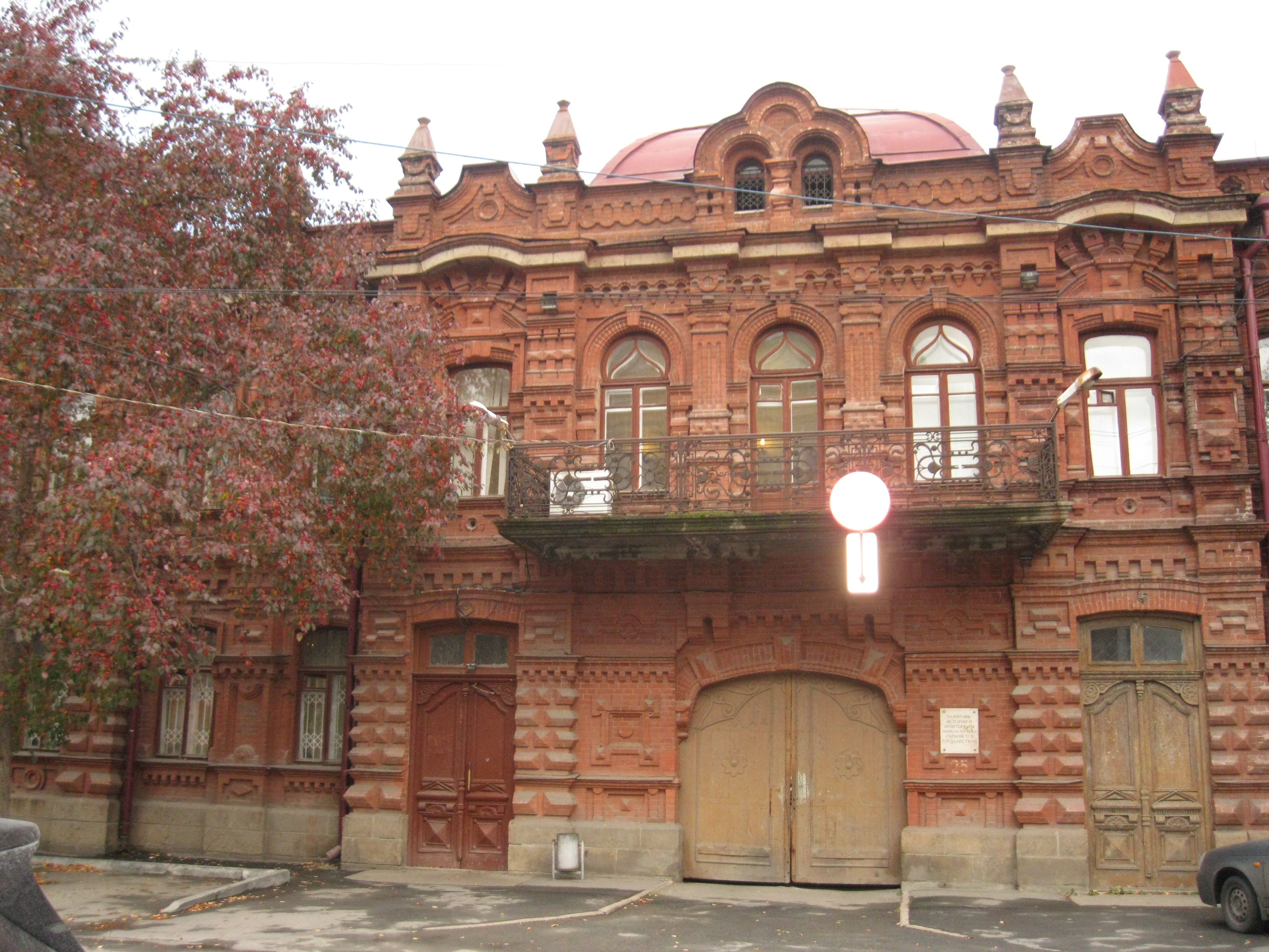 Особняк Хованова (Челябинская область, Челябинск, улица Васенко, 25)